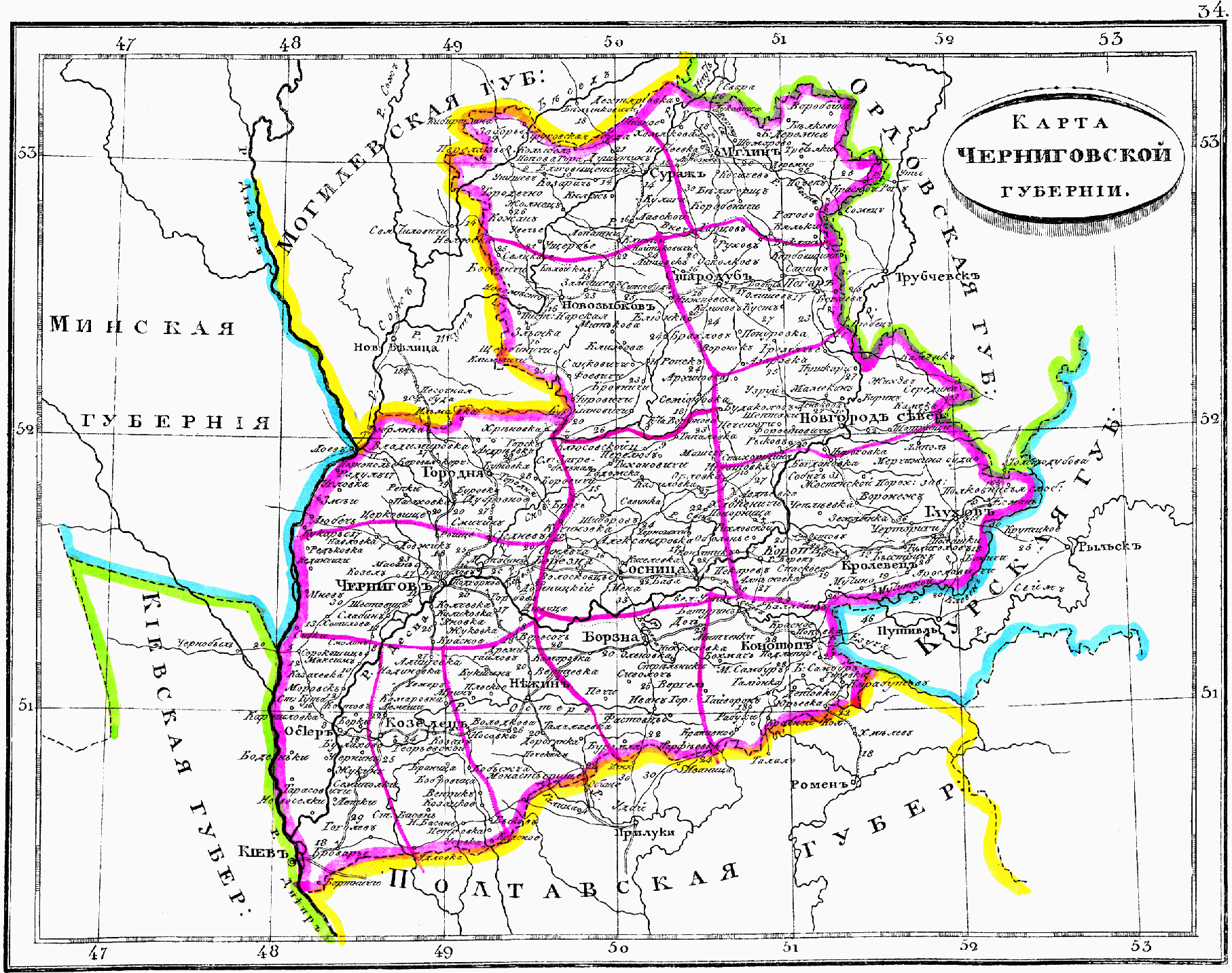 Карта Черниговской губернии, 1835